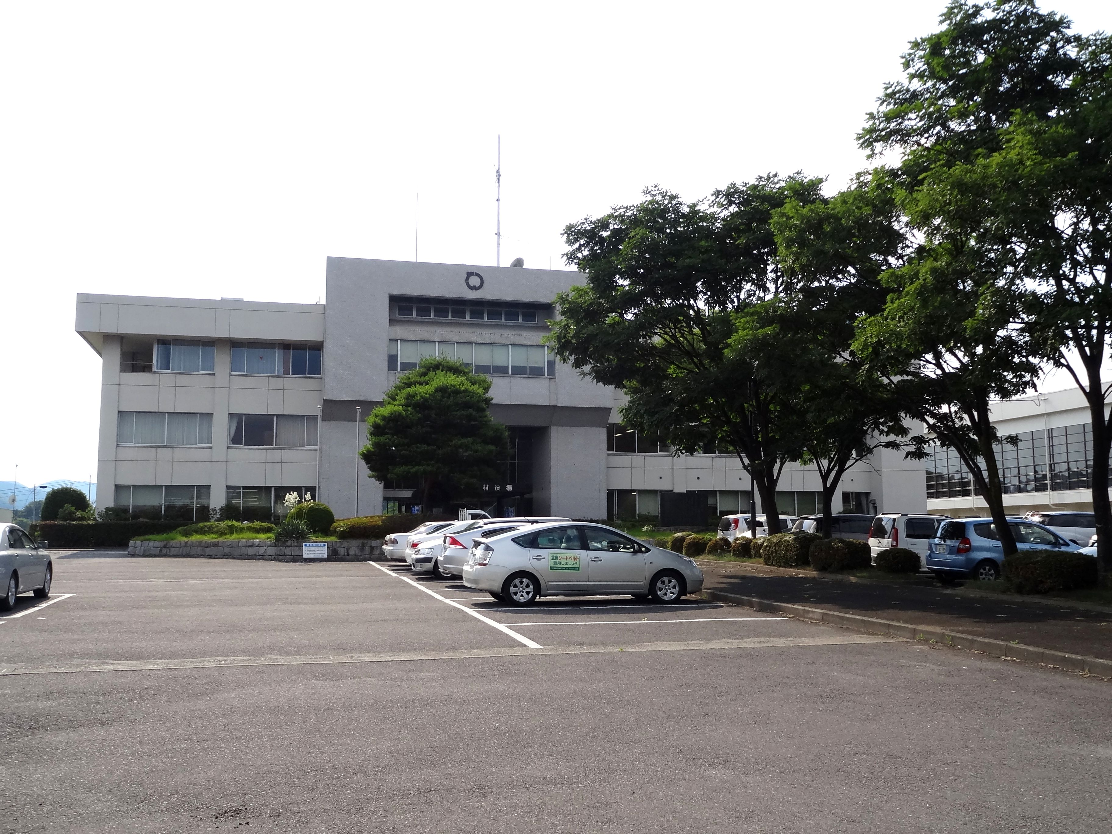 天栄村役場